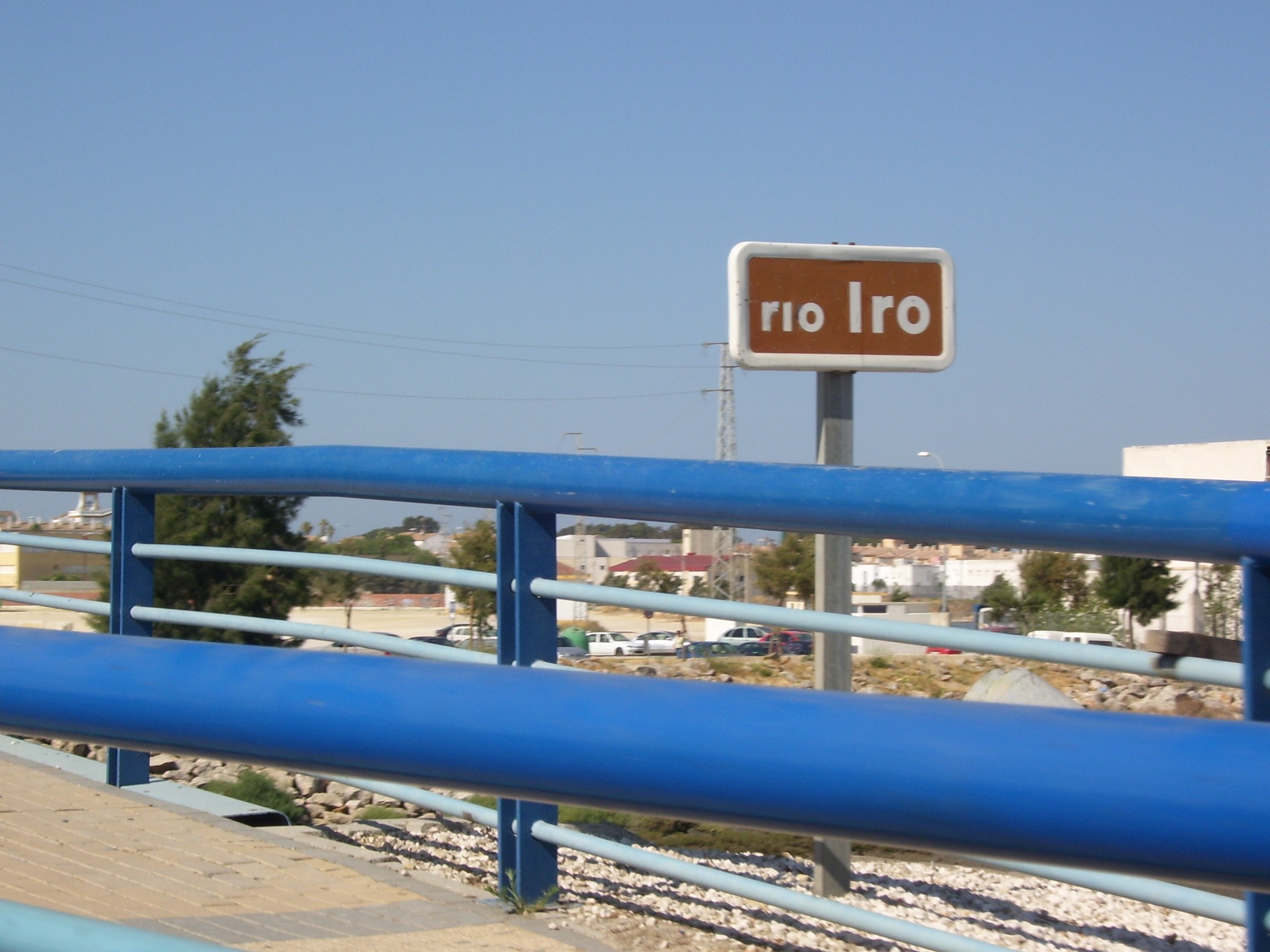 Foto de una señal del río Iro en el término municipal de Chiclana de la Frontera (Cádiz, España) en una de las orillas del puente del VII Centenario.